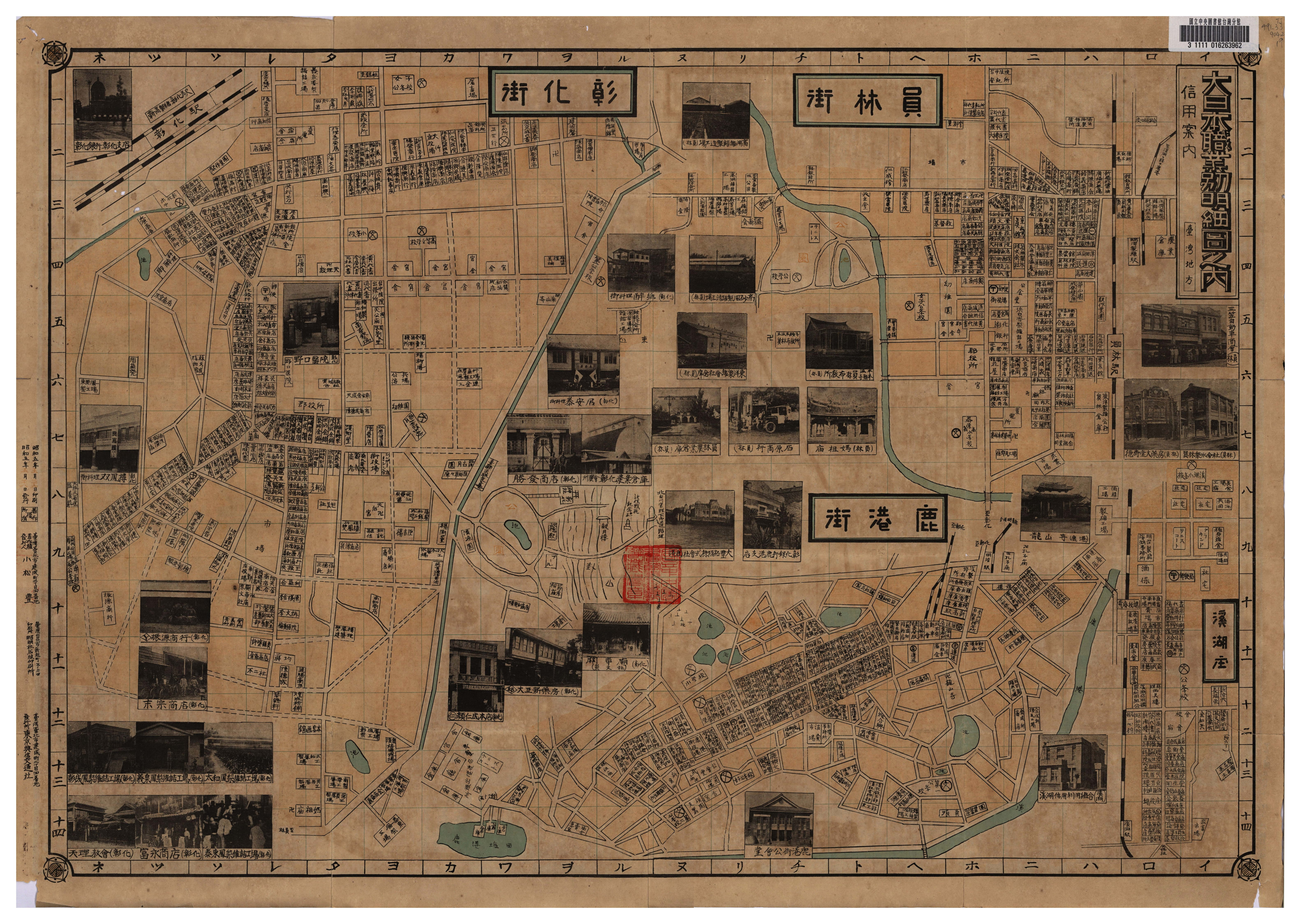 詳列四街庄各商家、設施的位置